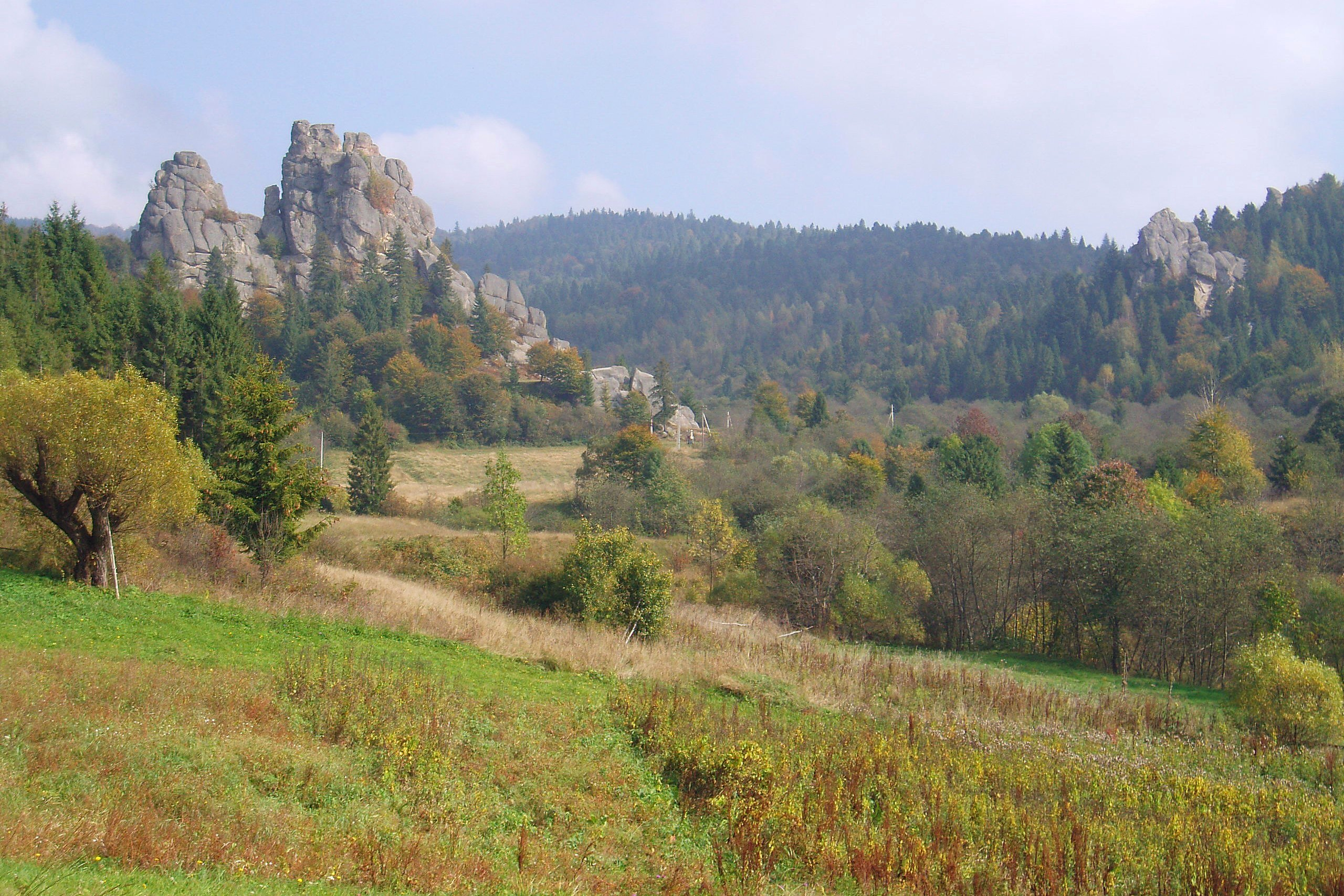 Тустань, Сколівський райони